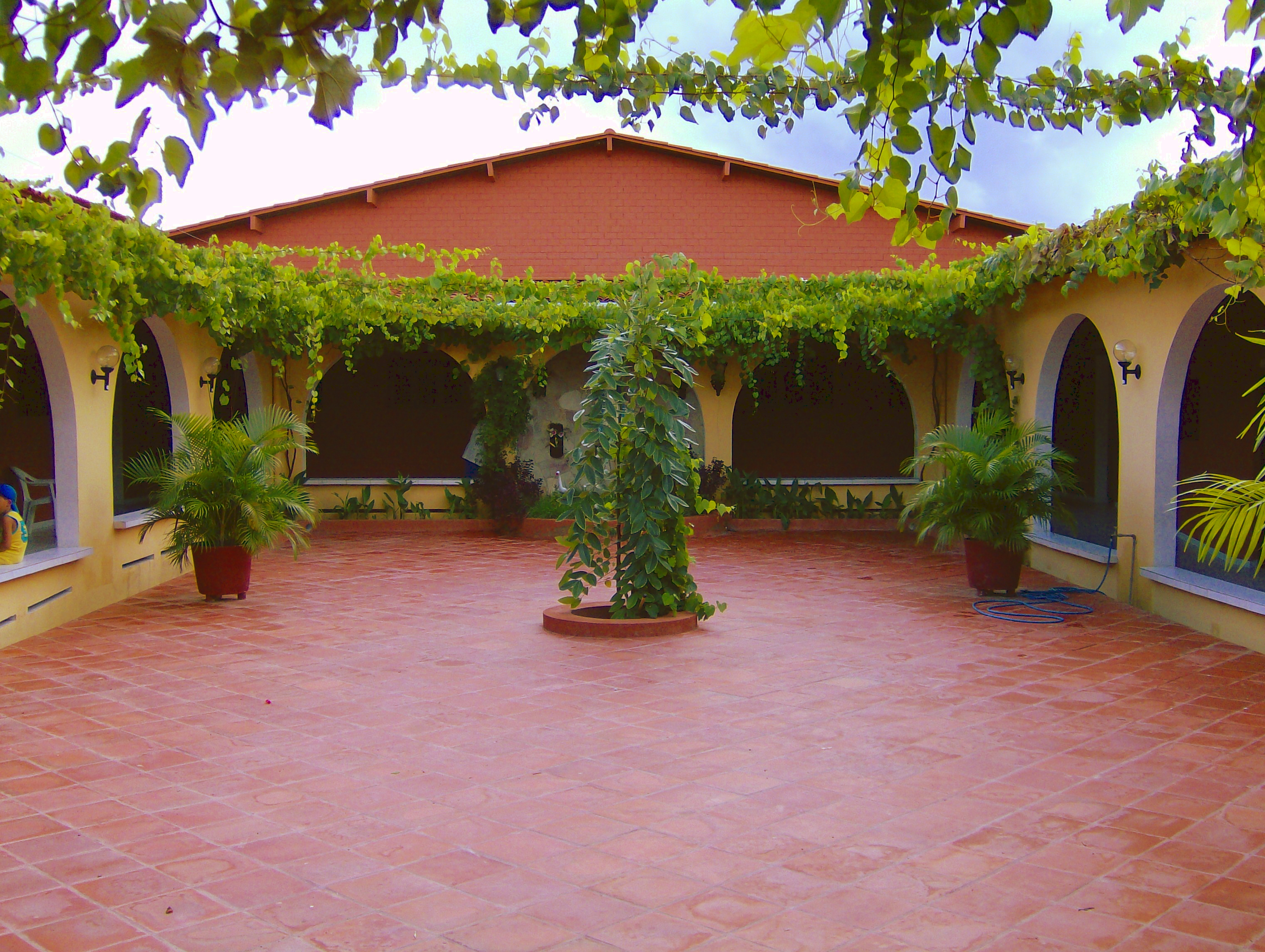 Pátio do Abrigo Bom Pastor em Belém-PB